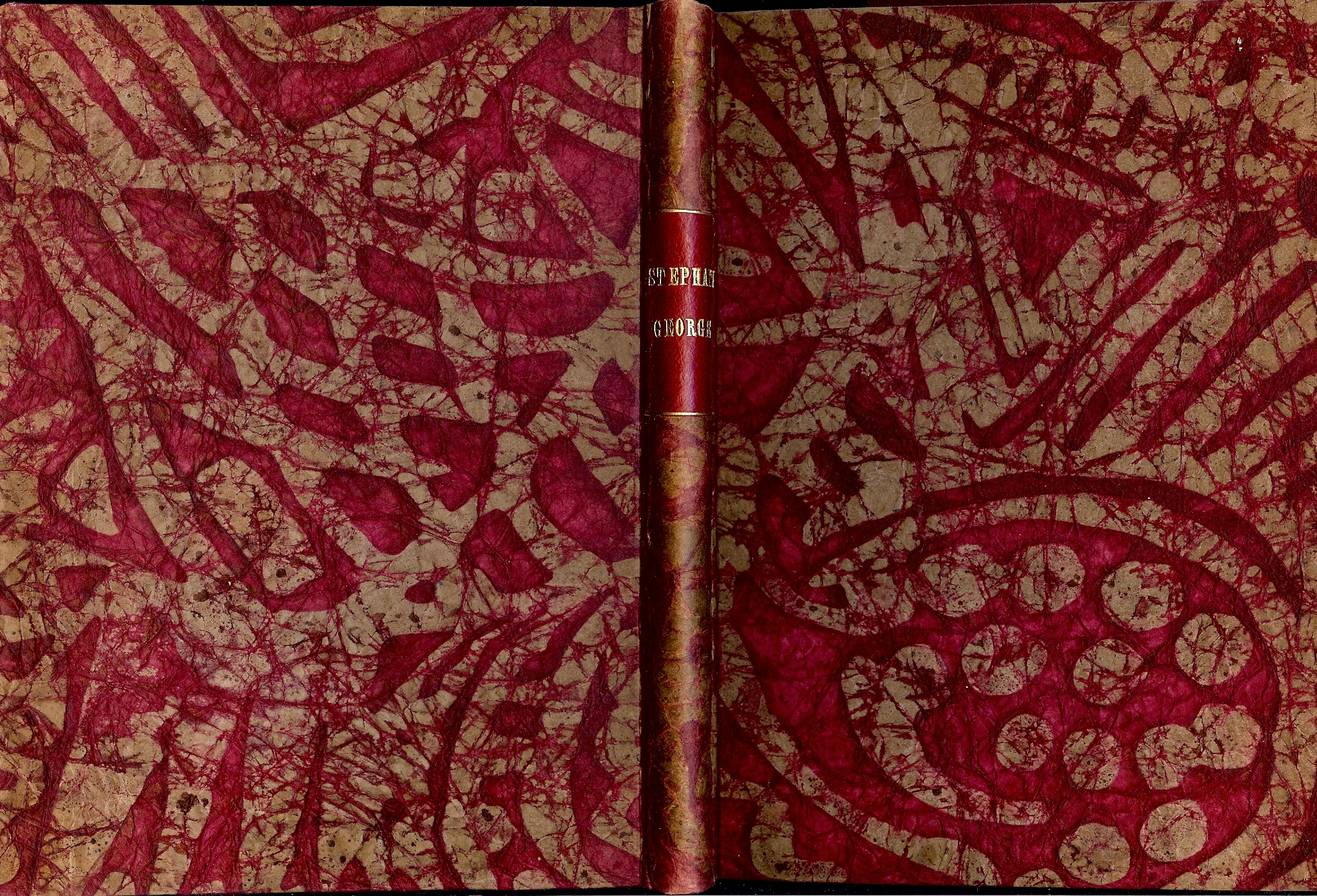 George, Stefan - Teppich des Lebens, 1919, Berlin